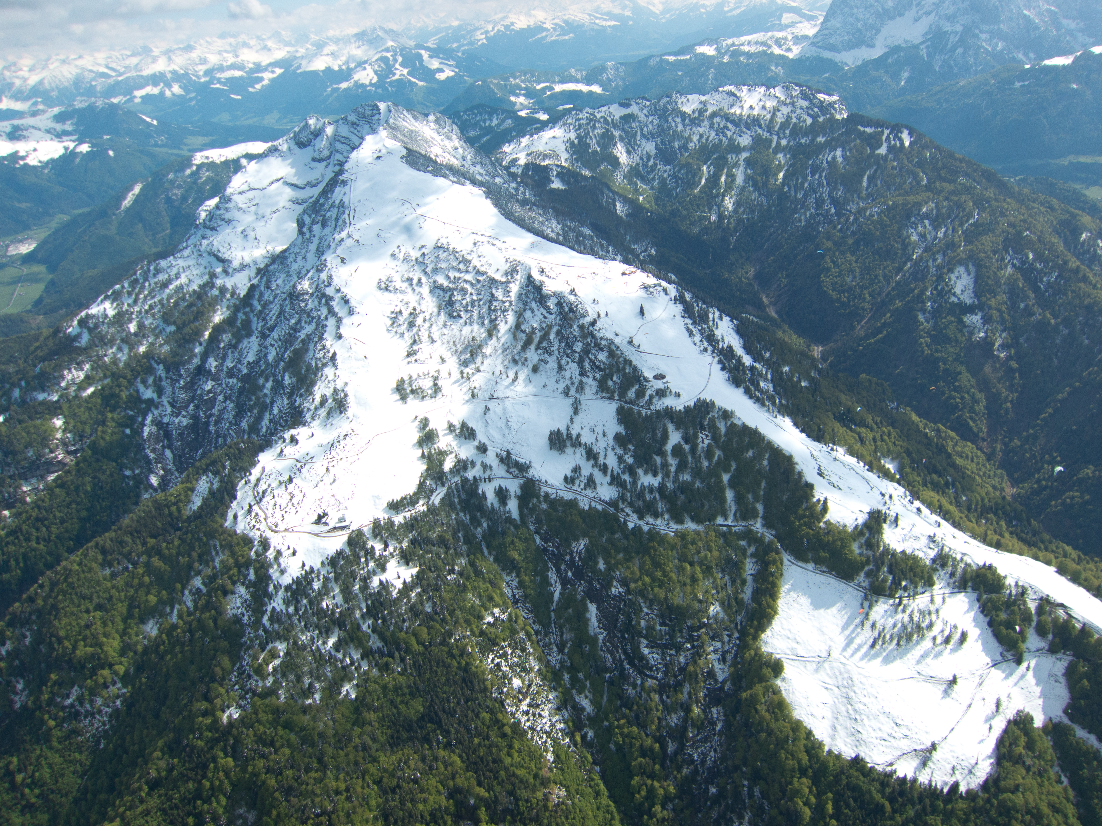 Unterberghorn aus Blickrichtung Norden